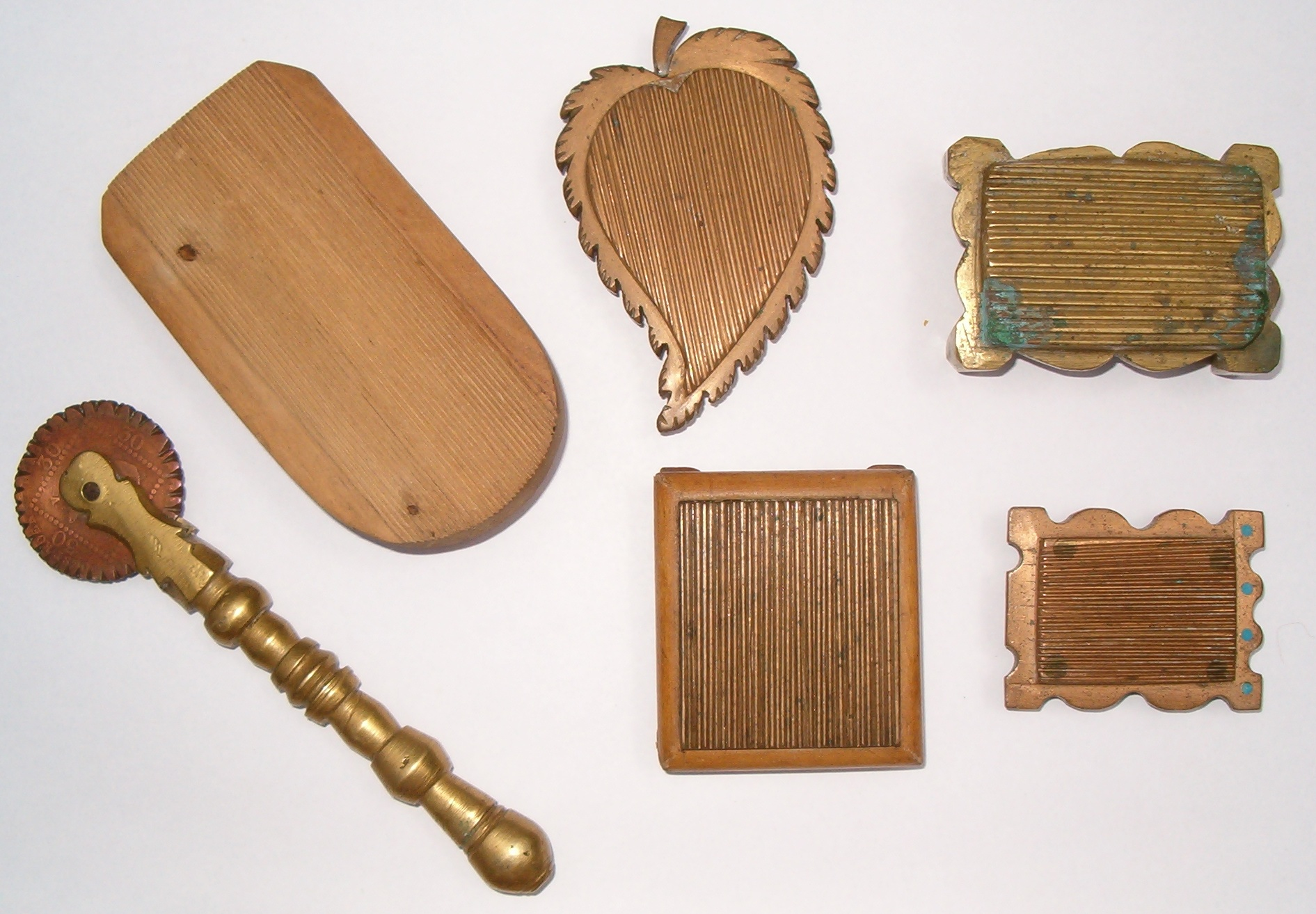 a csigatészta készítésének eszközei (eltekintve a derelyevágótól)